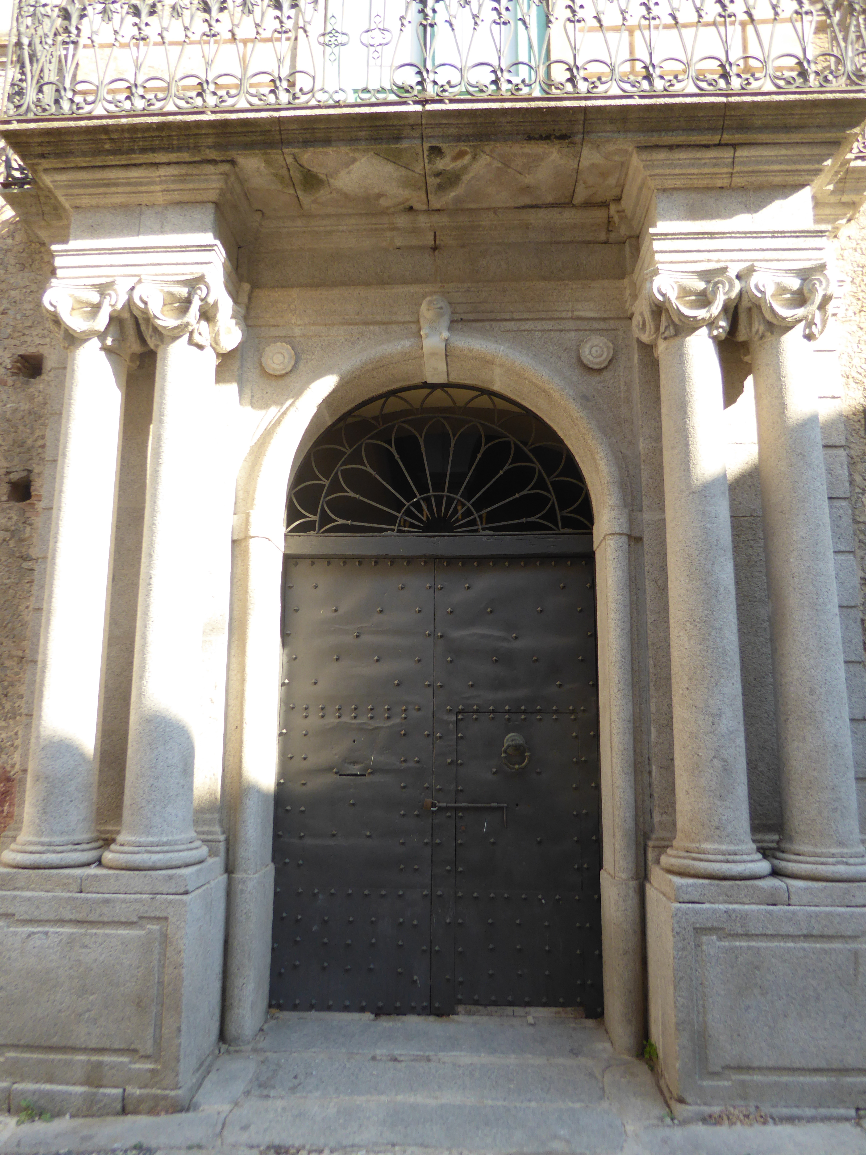 Palazzo Falletti - Ingresso (Guardavalle agosto 2019)